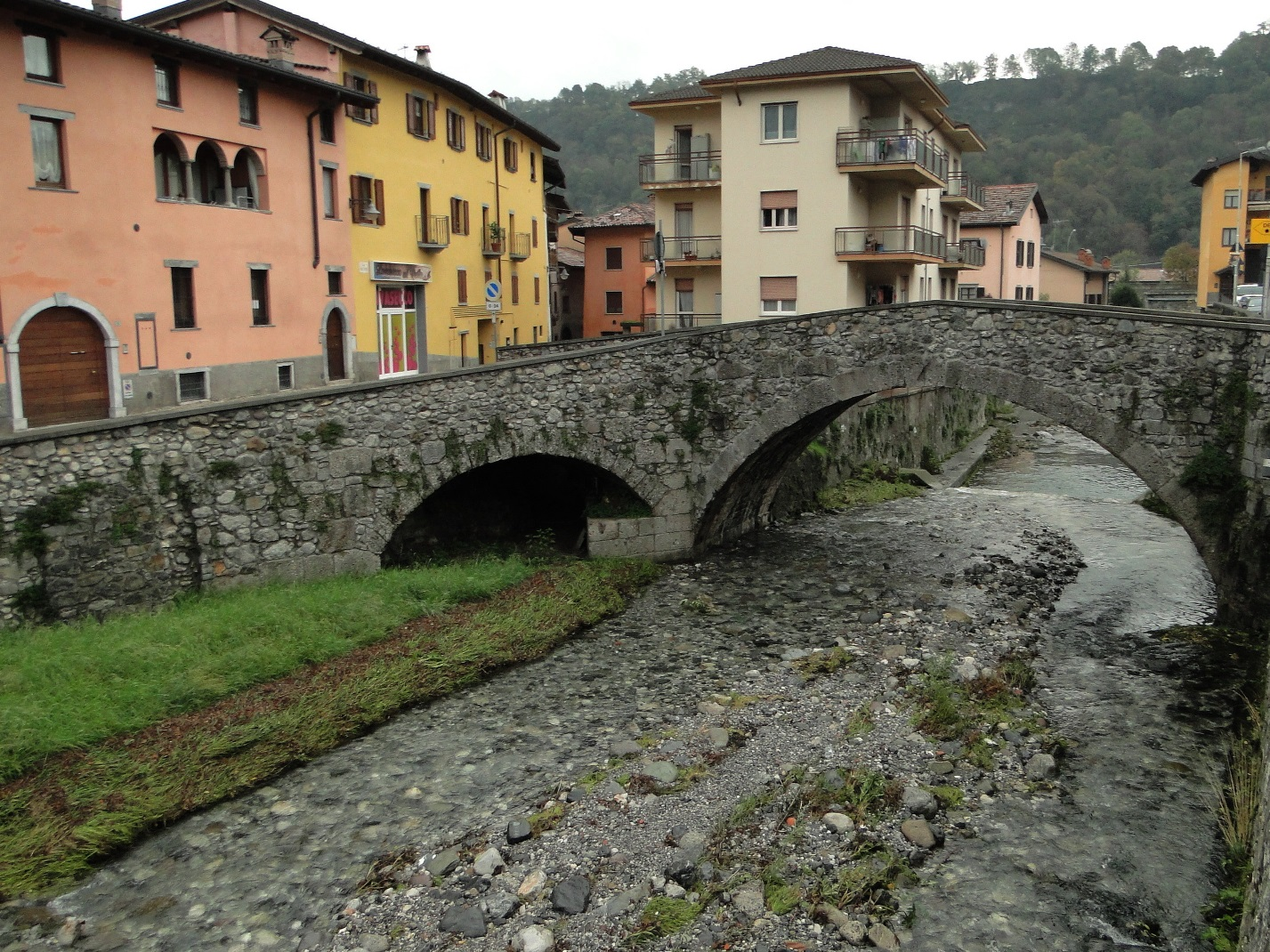 Ponte San Carlo, XV sec. Vertova (BG). Italia